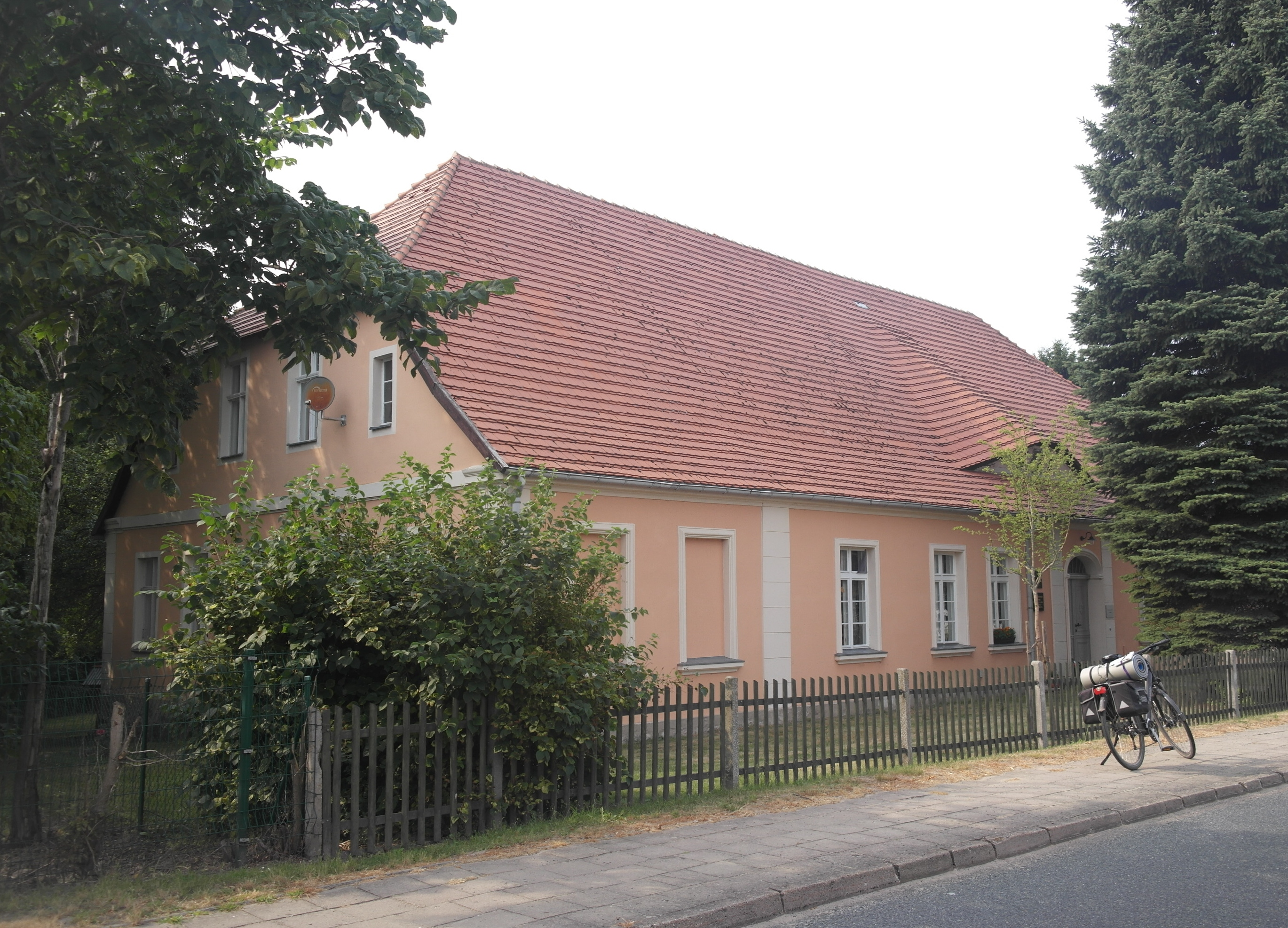 Spantekow, denkmalgeschütztes Pfarrhaus, Geburtshaus des Germanisten Johann Christoph Adelung